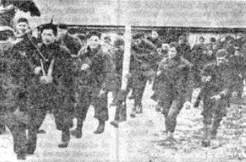 Enote štirinajste divizije pri Sv. Jani 10. januarja 1944